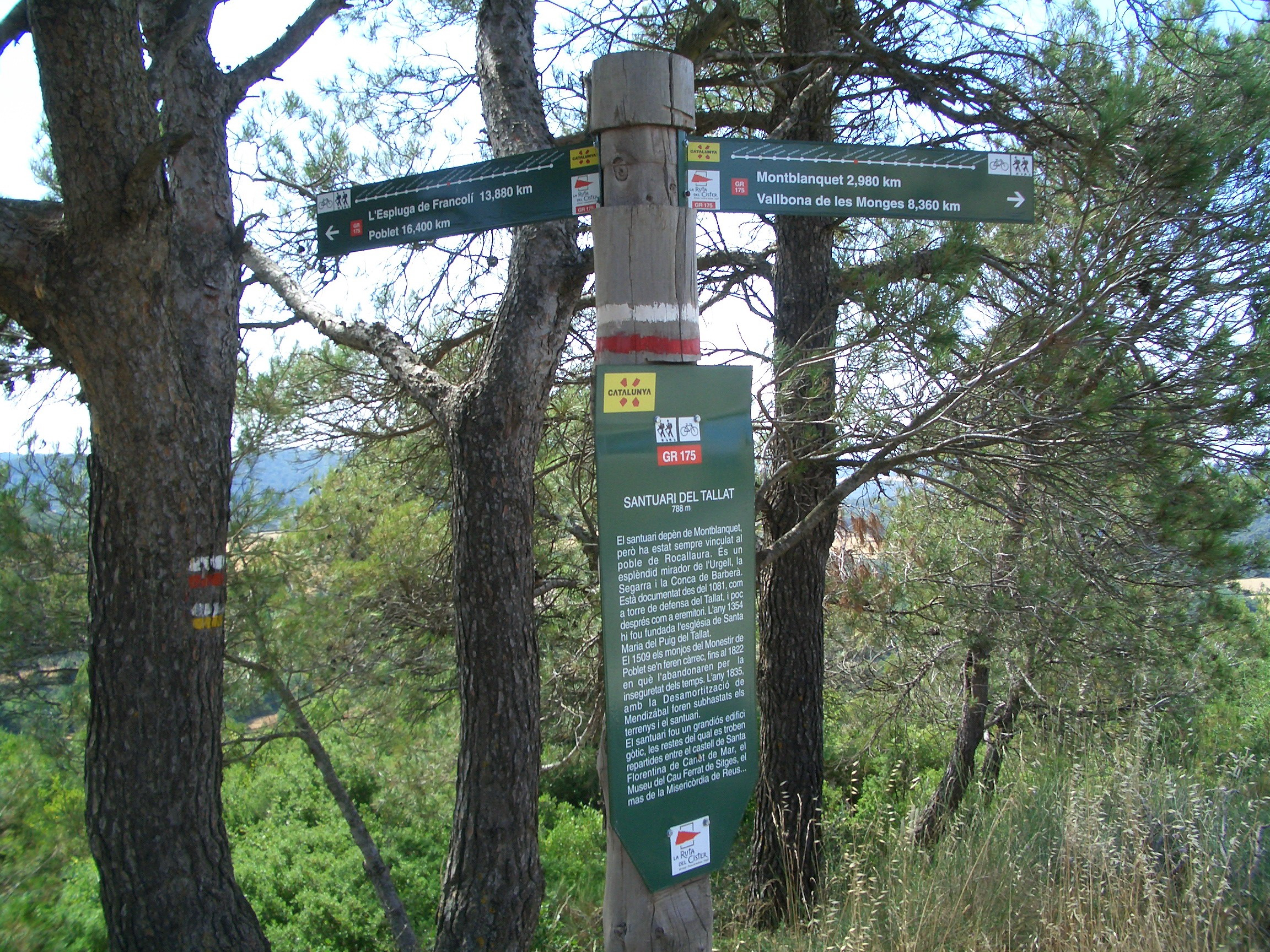 Cartell indicador del GR 175 al Santuari del Tallat